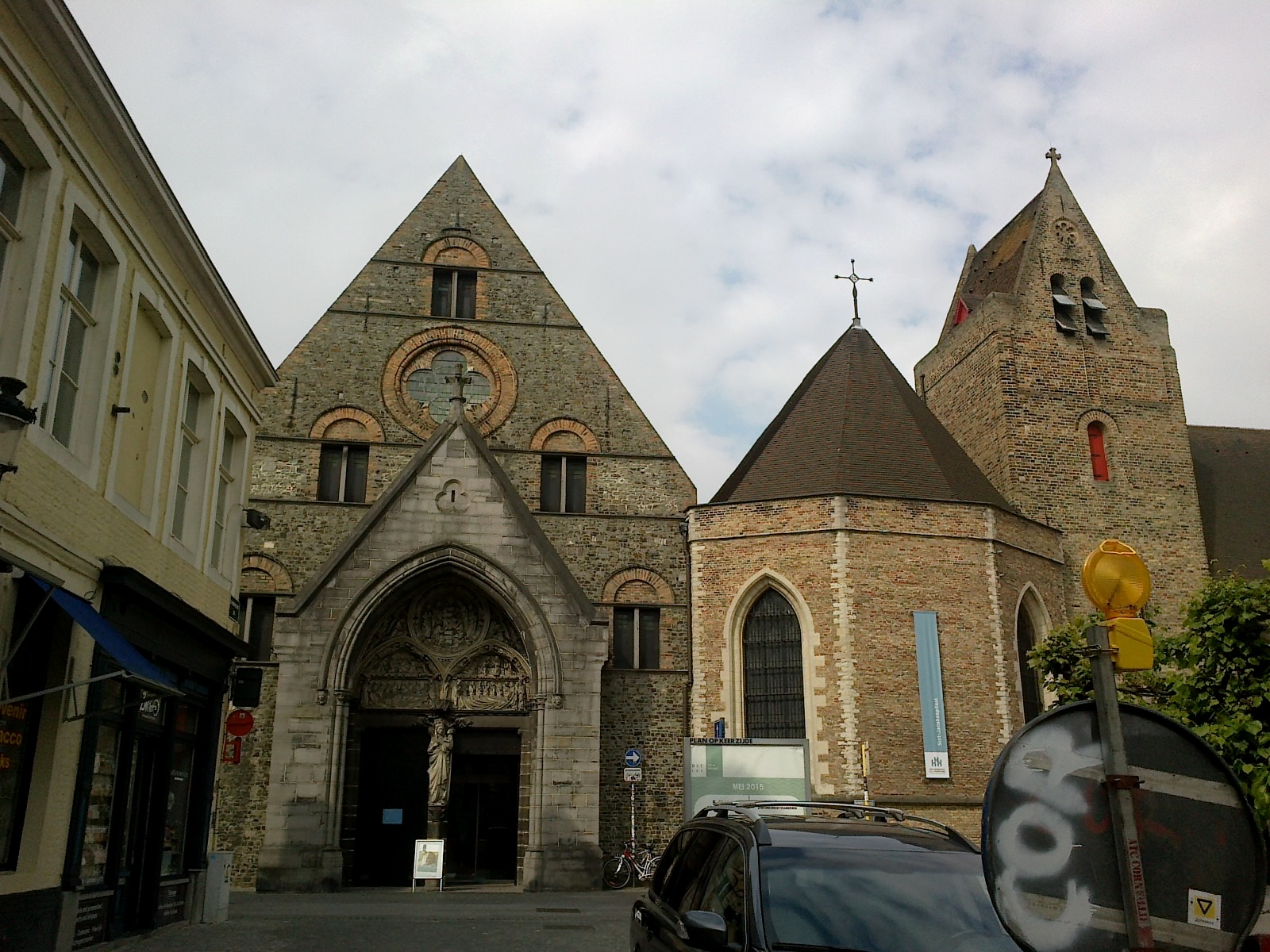 Belgique Bruges Musee Memling